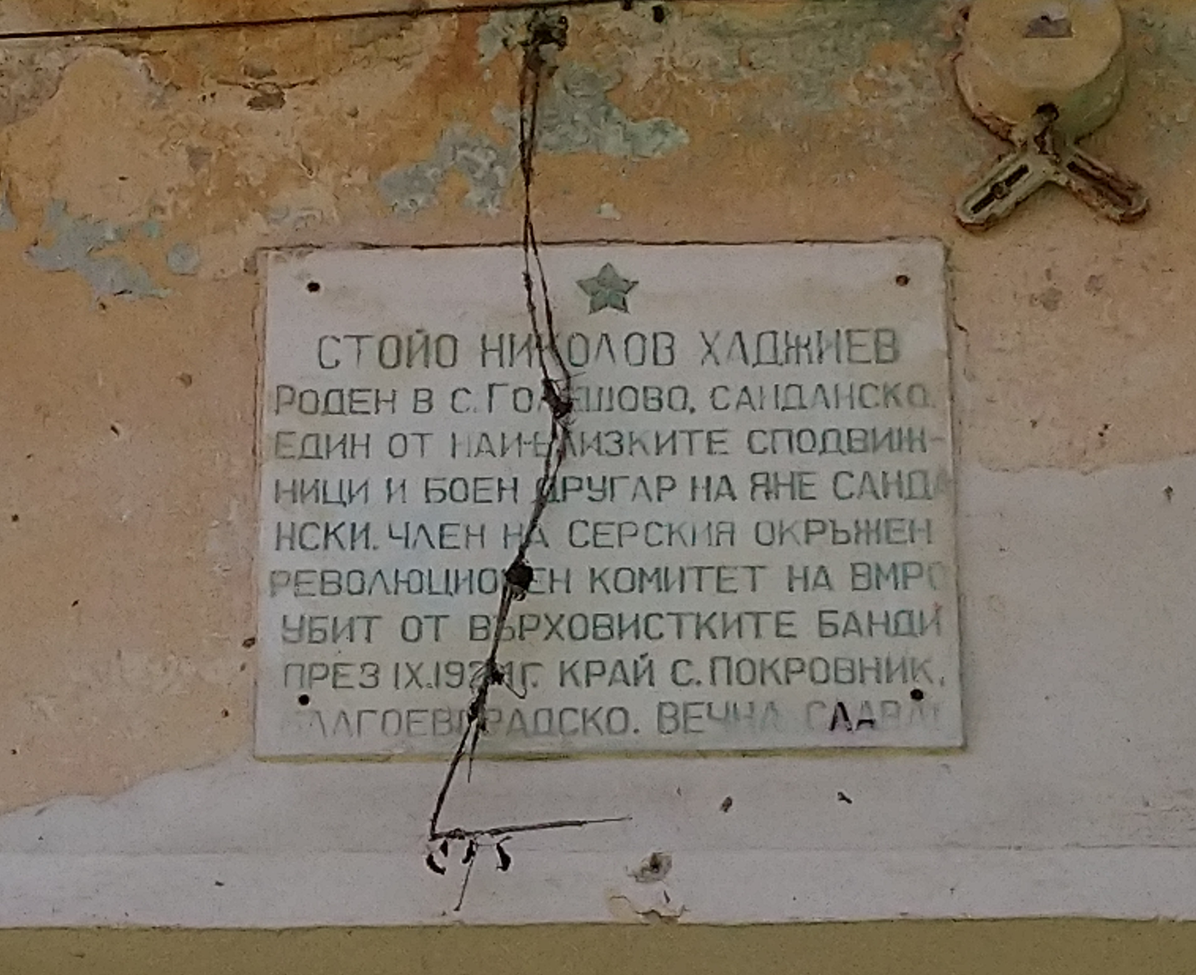 Паметна плоча на Стойо Хаджиев на стената на училището в село Голешово